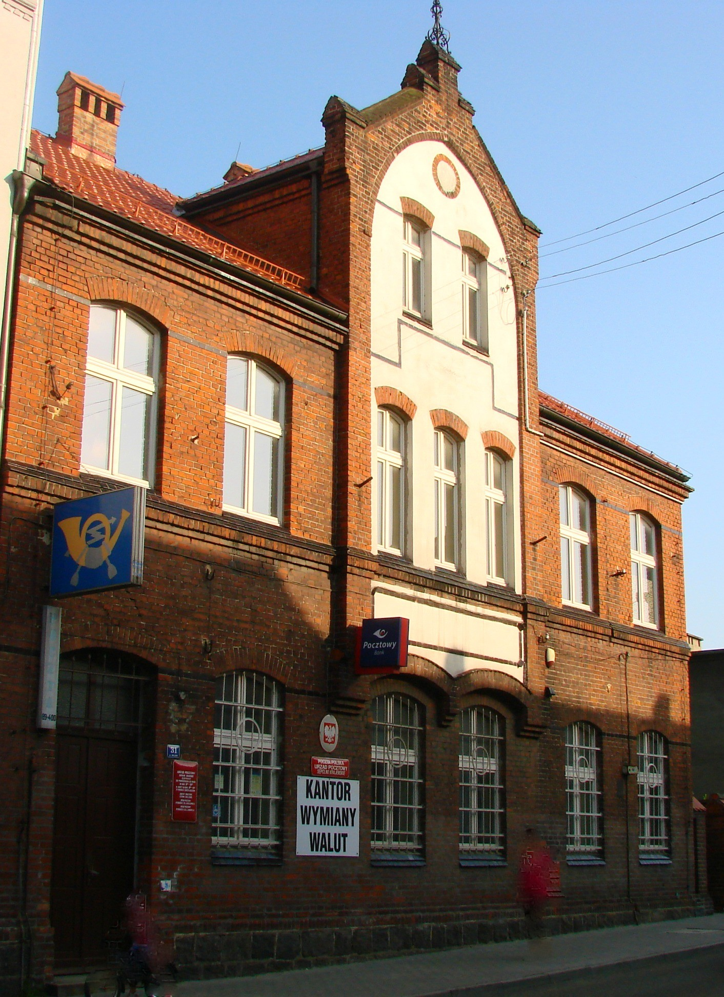 Budynek Urzędu Poczty Polskiej, na Starym Mieście; przy ul. Gen. J. Hallera. Obiect in Sępólno Krajeńskie, Poland.